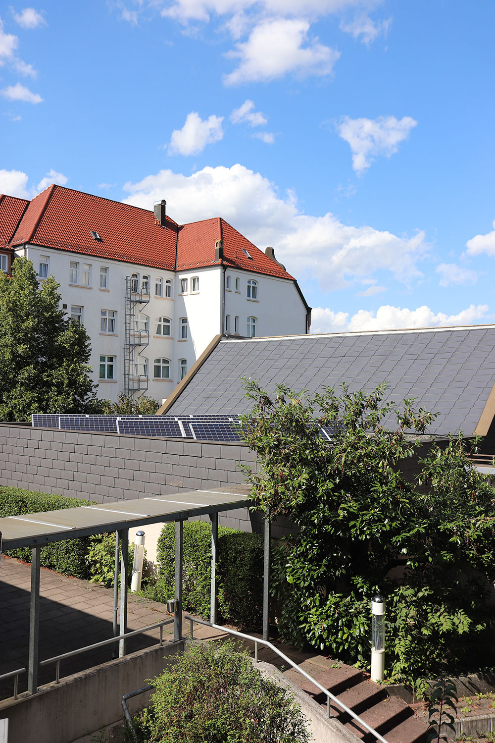 THR Lehrgebäude und Haus Schempp